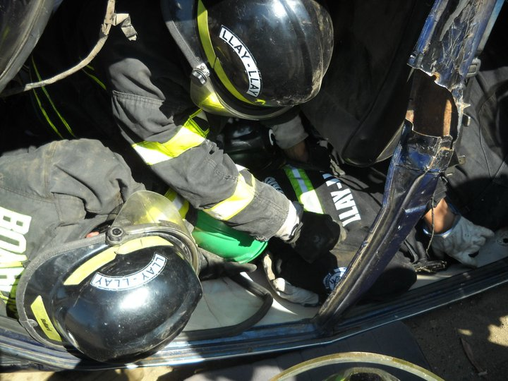 Foto sacada de un curso realizado por voluntarios de la Segunda Compañia.